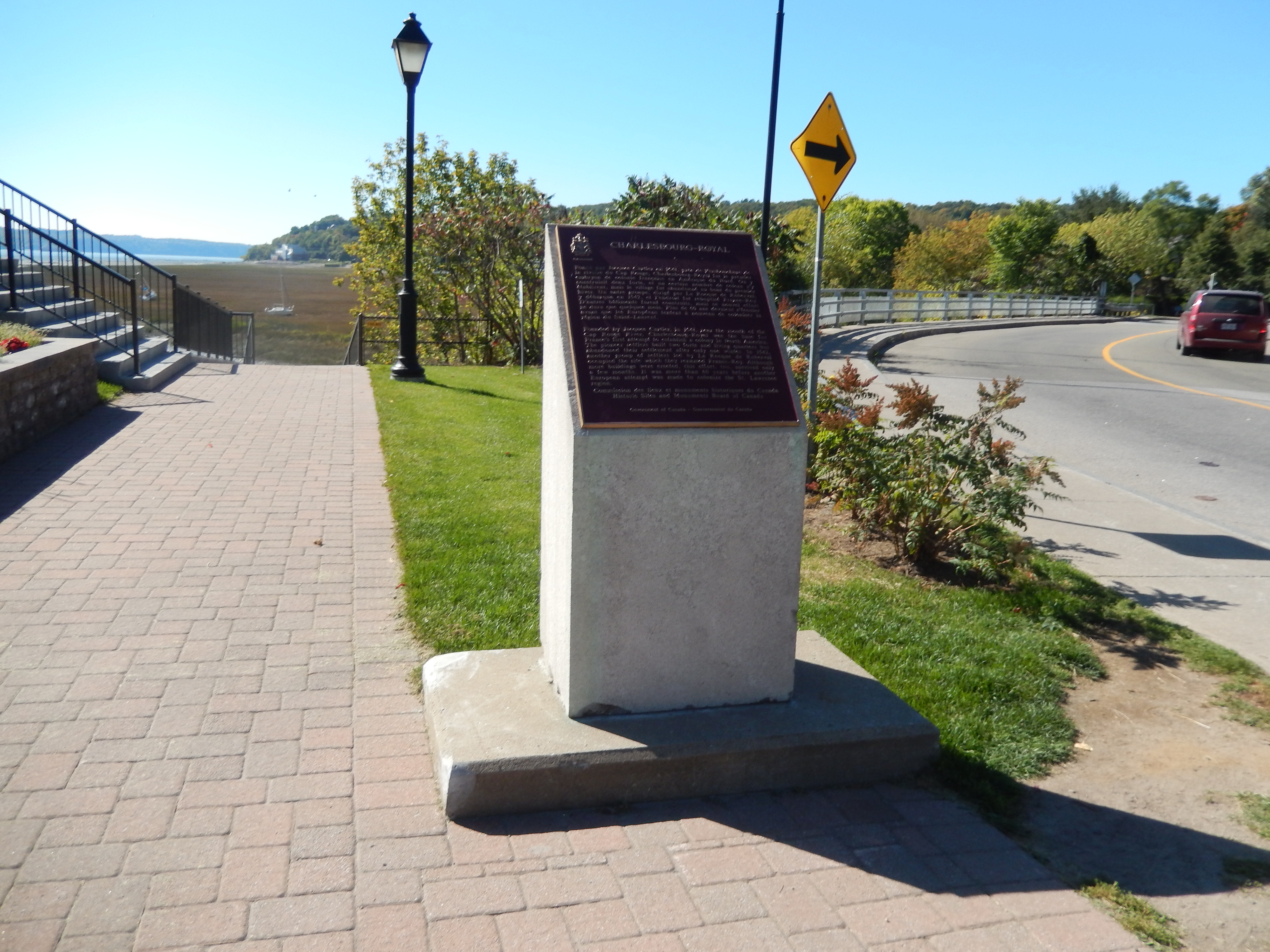 Monument du fort Charlebourg-Royal